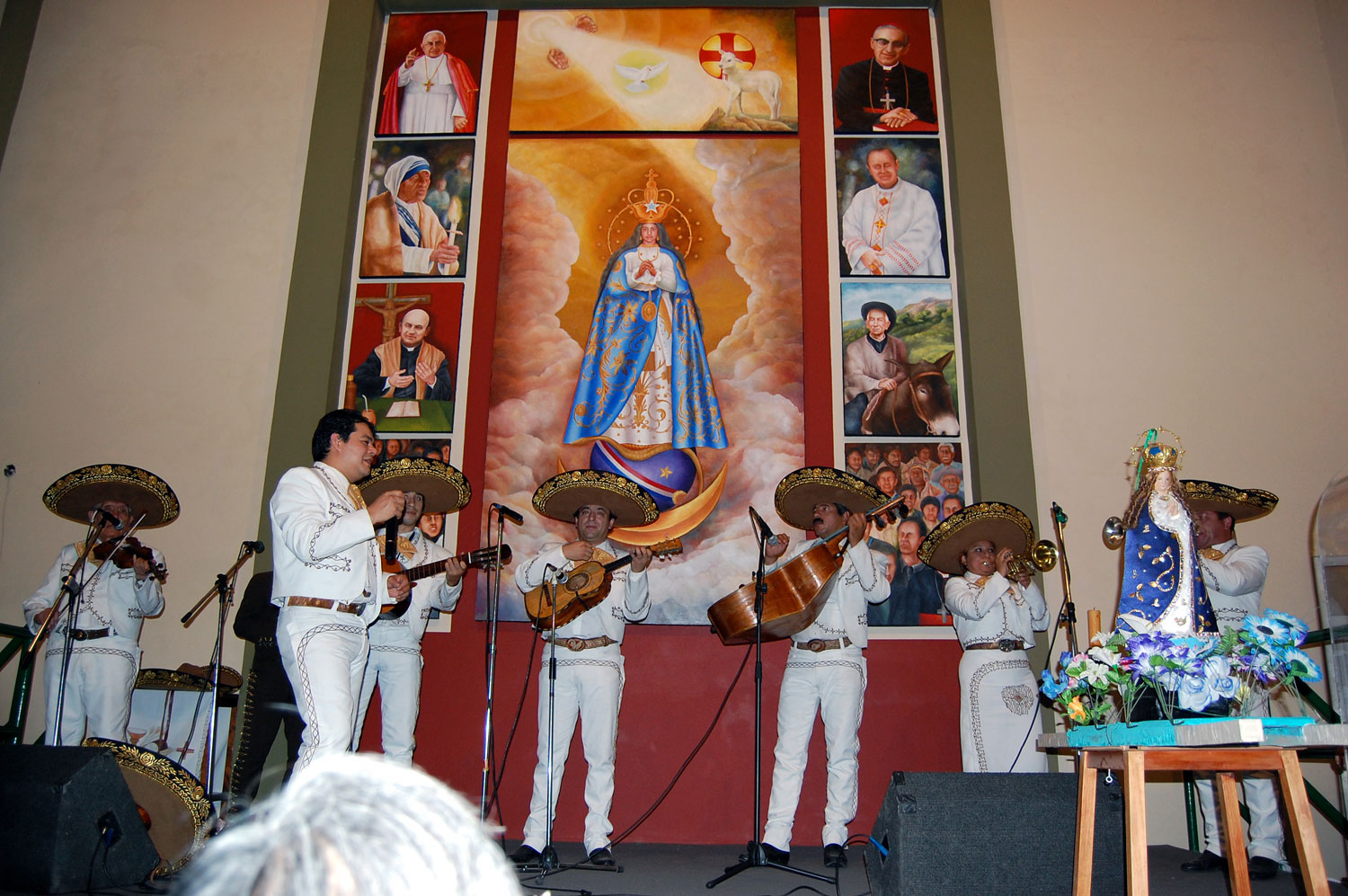 En la Fiesta Patronal de la Virgen de Caacupé. Durante la serenata, Los Mariachis. A eso de las 6:00, este grupo musical y la comunidad le cantan "las mañanitas" a la Virgen.